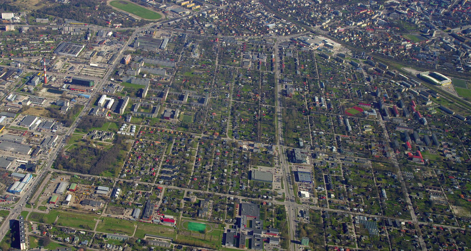 Õhuvaade Kristiine linnaosa põhjaosale